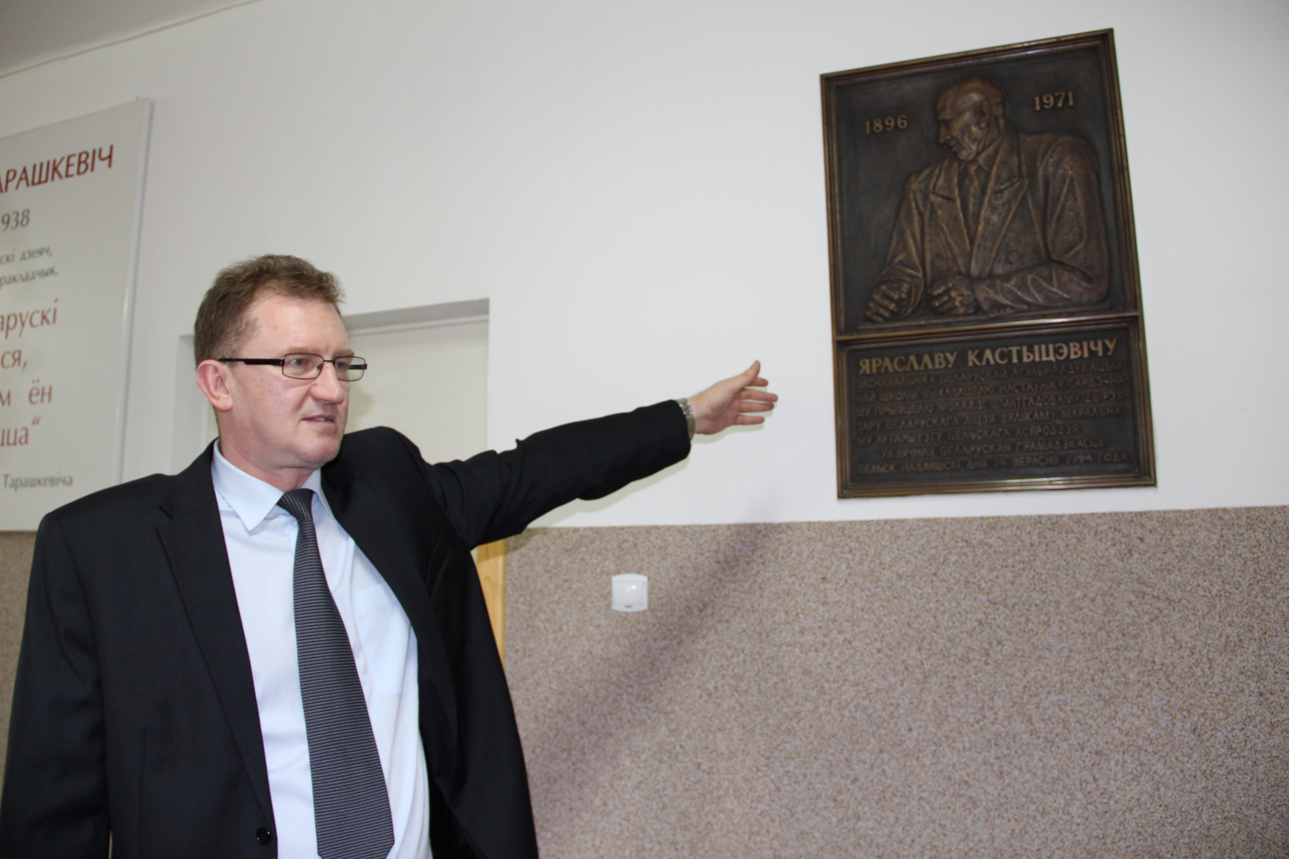 II Liceum Ogólnokształcące w Bielsku Podlaskim.